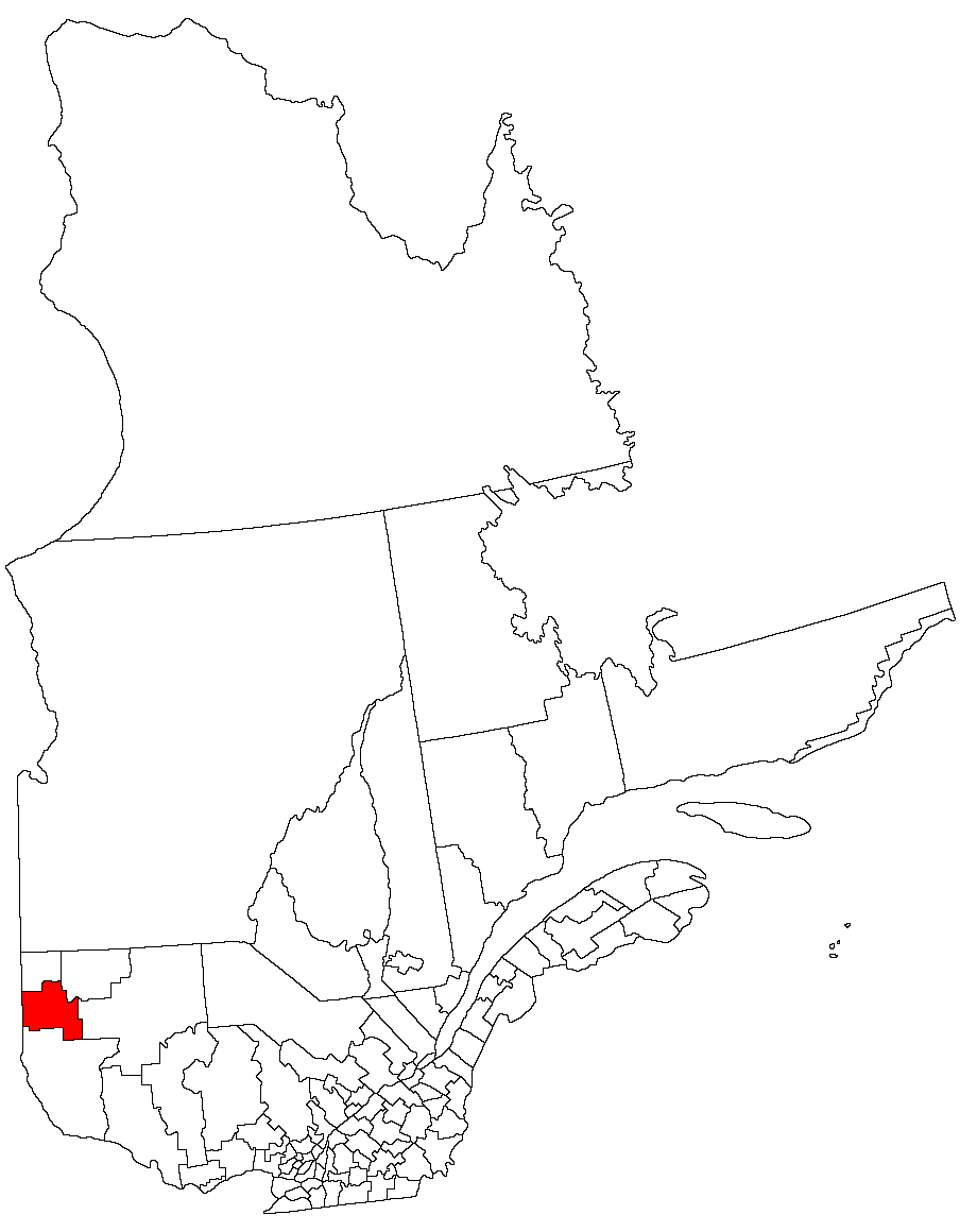 Rouyn-Noranda, Quebec